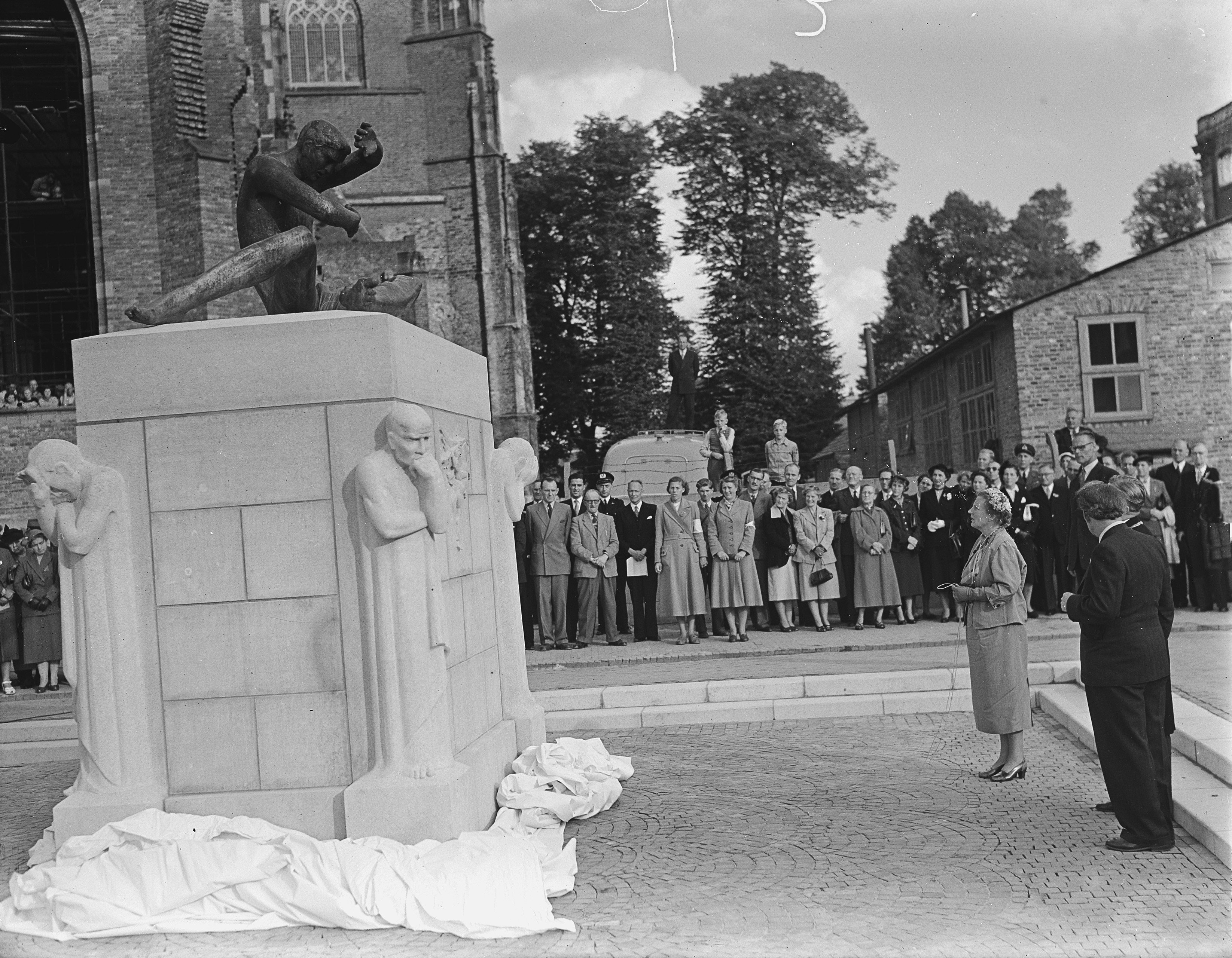 Collectie / Archief : Fotocollectie Anefo Reportage / Serie : [ onbekend ] Beschrijving : Koningin Juliana onthult monument bij de St. Eusebiuskerk te Arnhem Annotatie : Het gaat om het beeld "Mens tegen Macht" van de beeldhouwer Gijs Jacobs van den Hof Datum : 17 september 1953 Locatie : Arnhem, Gelderland Trefwoorden : beeldhouwkunst, koninginnen, koninklijk huis, onthullingen, oorlogsmonumenten Persoonsnaam : Juliana (koningin Nederland) Fotograaf : Noske, J.D. / Anefo, [onbekend] Auteursrechthebbende : Nationaal Archief Materiaalsoort : Glasnegatief Nummer archiefinventaris : bekijk toegang 2.24.01.09 Bestanddeelnummer : 905-9625